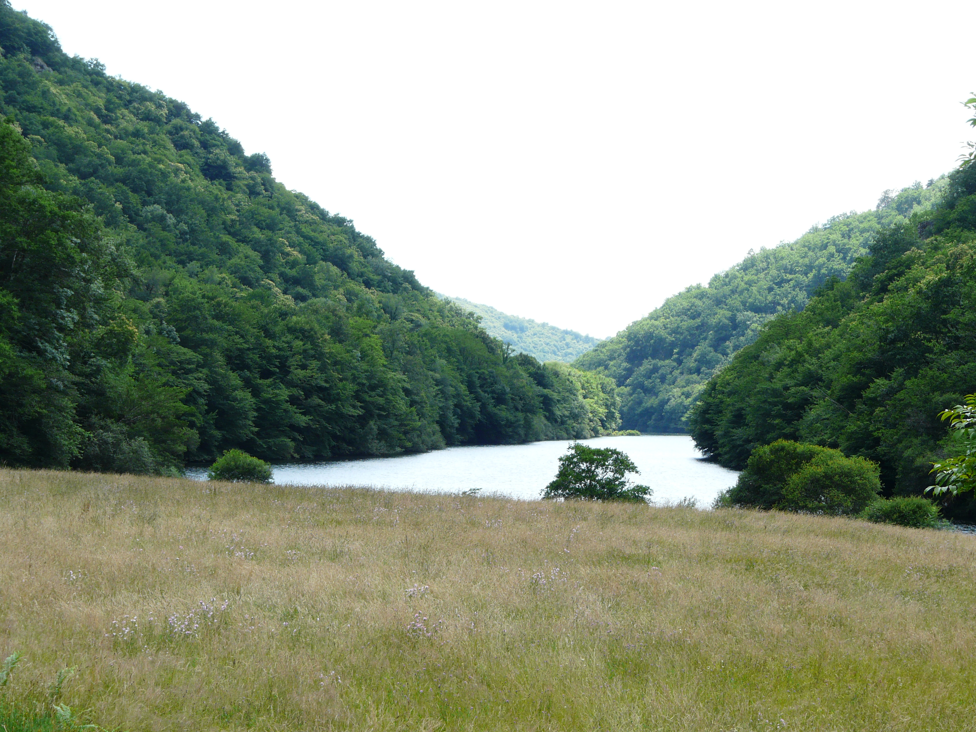 La Dordogne (retenue du barrage d'Argentat) vue depuis Glény, Servières-le-Château, Corrèze, France.